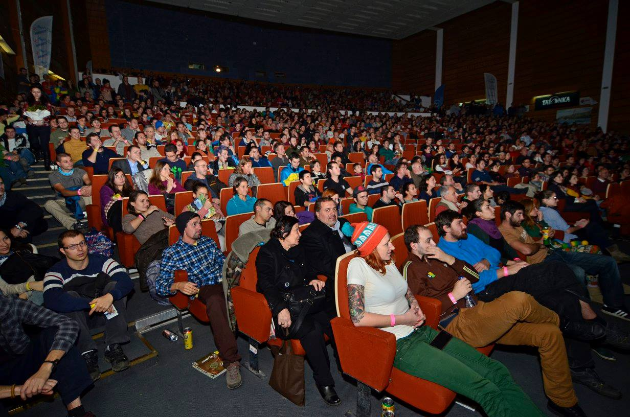 Публика Дни на предизвикателствата